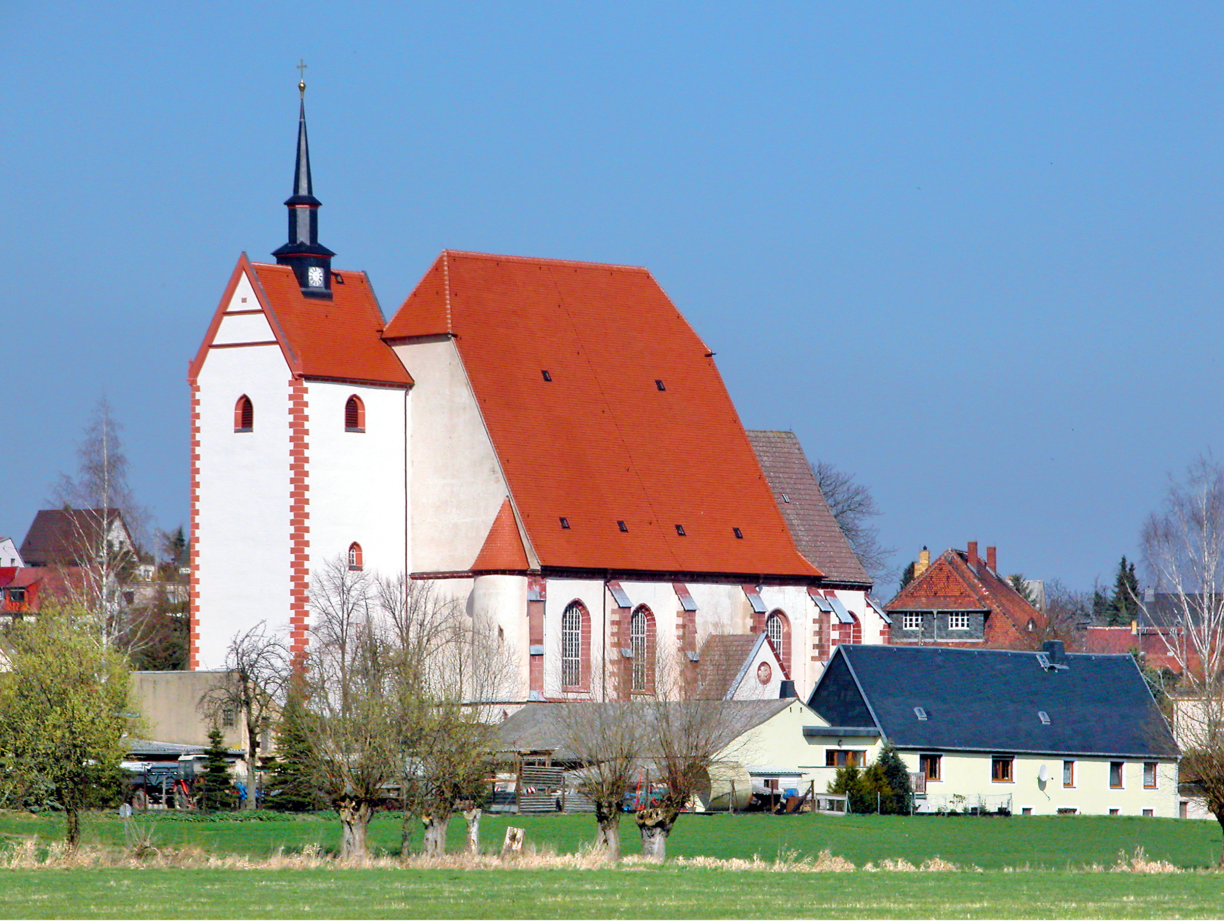 31.03.2009 04769 Altmügeln (Mügeln): Straße des Friedens (GMP: 51.240064,13.035497). Marienkirche. Mittelalterliche Wallfahrtskirche. 1487 und 1512 als eine der letzten von Grund auf im Stile der Spätgotik neu gebaut. Nur der wuchtige Turm stammt noch von der alten Wehrkirche. Ein Blitzeinschlag verursachte 1536 schwere Zerstörungen. Als die Marienkirche 1539 erneut fertig war, gärte im Land schon die Reformation. Sie ist eine der letzten alten Kirchen, die nach katholischen Ritus geweiht wurden. Erst zwei Jahre später wurde hier lutherisch gepredigt. Auf dem Mügelner Schloß ging ja immer noch der katholische Bischof ein und aus. Für ein Gewölbe reichte wohl das Geld nicht mehr und so verzierte 1720 der Oschatzer Maler Johannes Roßberg die flache Holzfelderdecke zu einer sog. "Bilderbibel". Sie zeigt 36 Szenen und 6 Personen aus dem Neuen Testament. [DSCN35828.TIF]20090331060DR.JPG(c)Blobelt